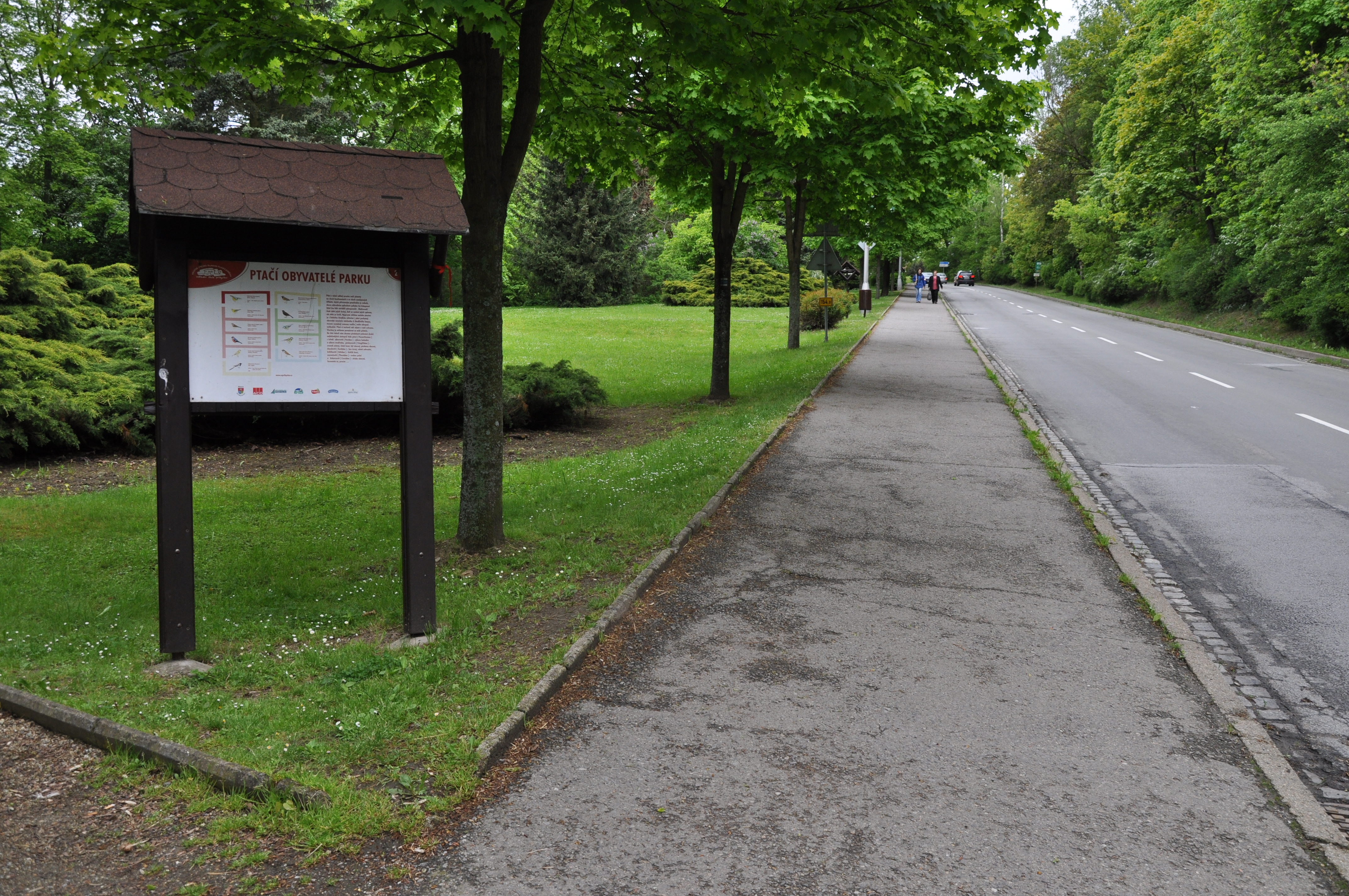 Husova ulice směrem od zámku k nádraží. Informační tabule o fauně zámeckého parku. Město Přibyslav. Okr. Havlíčkův Brod. Kraj vysočina. Czech Republik.